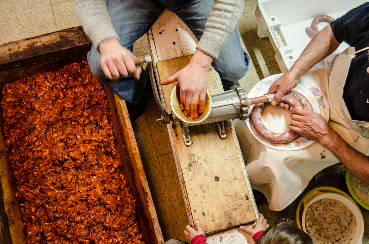 Embutiendo chorizos en Sandoval de la Reina. 2014